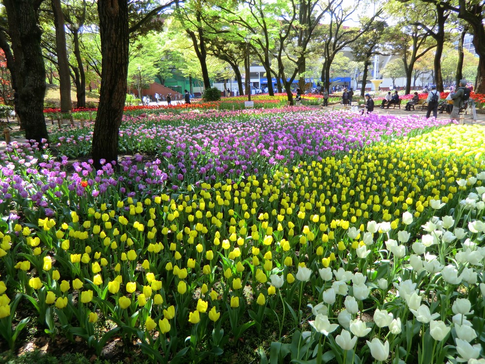 横浜公園(2011年4月投稿者が撮影)